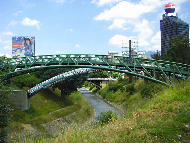 Guaire River. Libertador Municipality, Capital District, Venezuela.